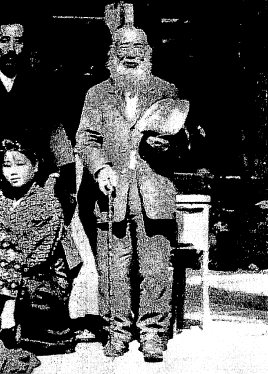 松蔭女学校副校長時代の川路寛堂 日下初子氏蔵